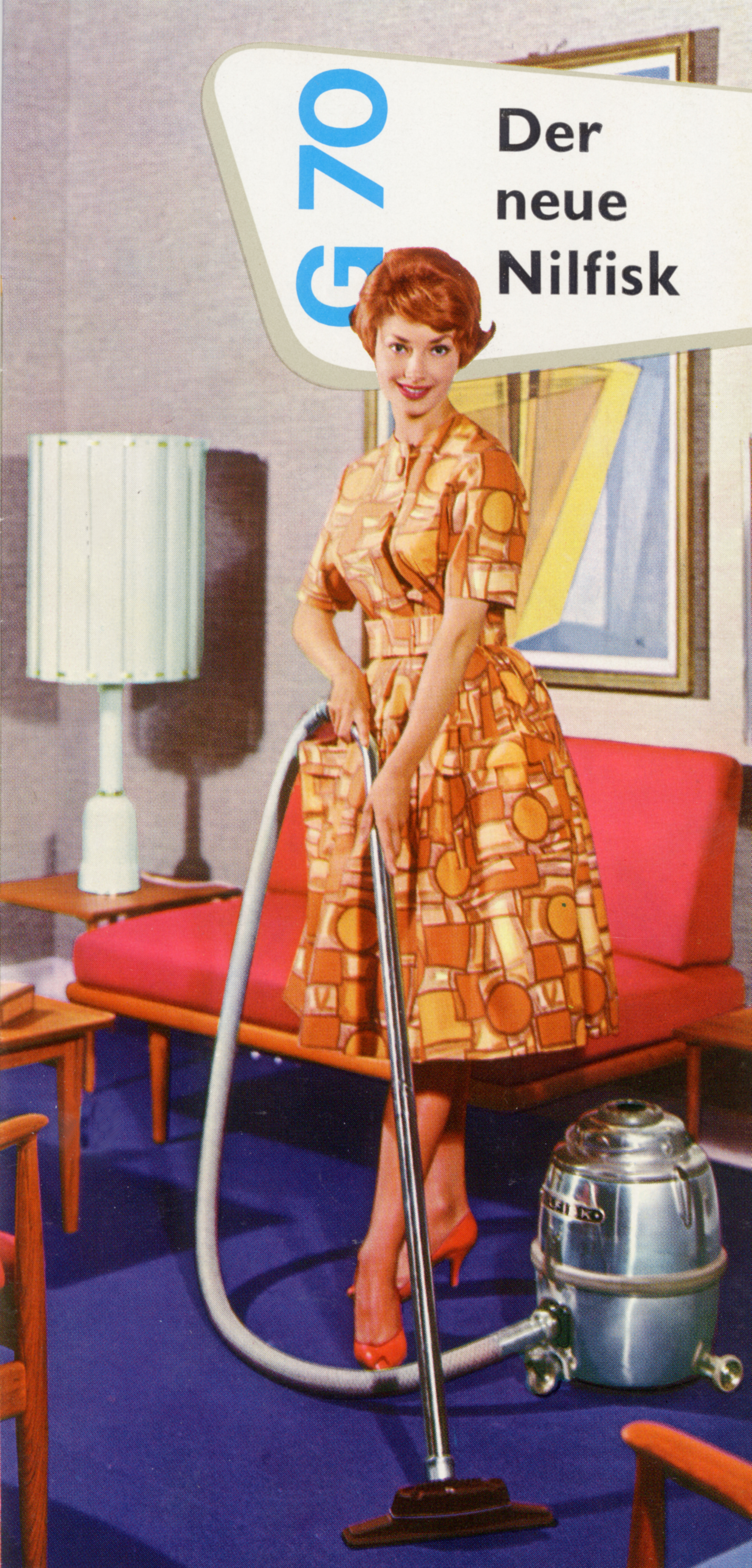 Tysk reklame for Nilfisk støvsuger model G 70